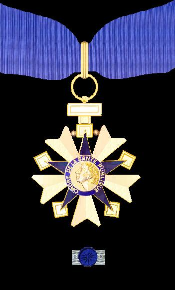 Eigen tekenwerk met windows bitmap